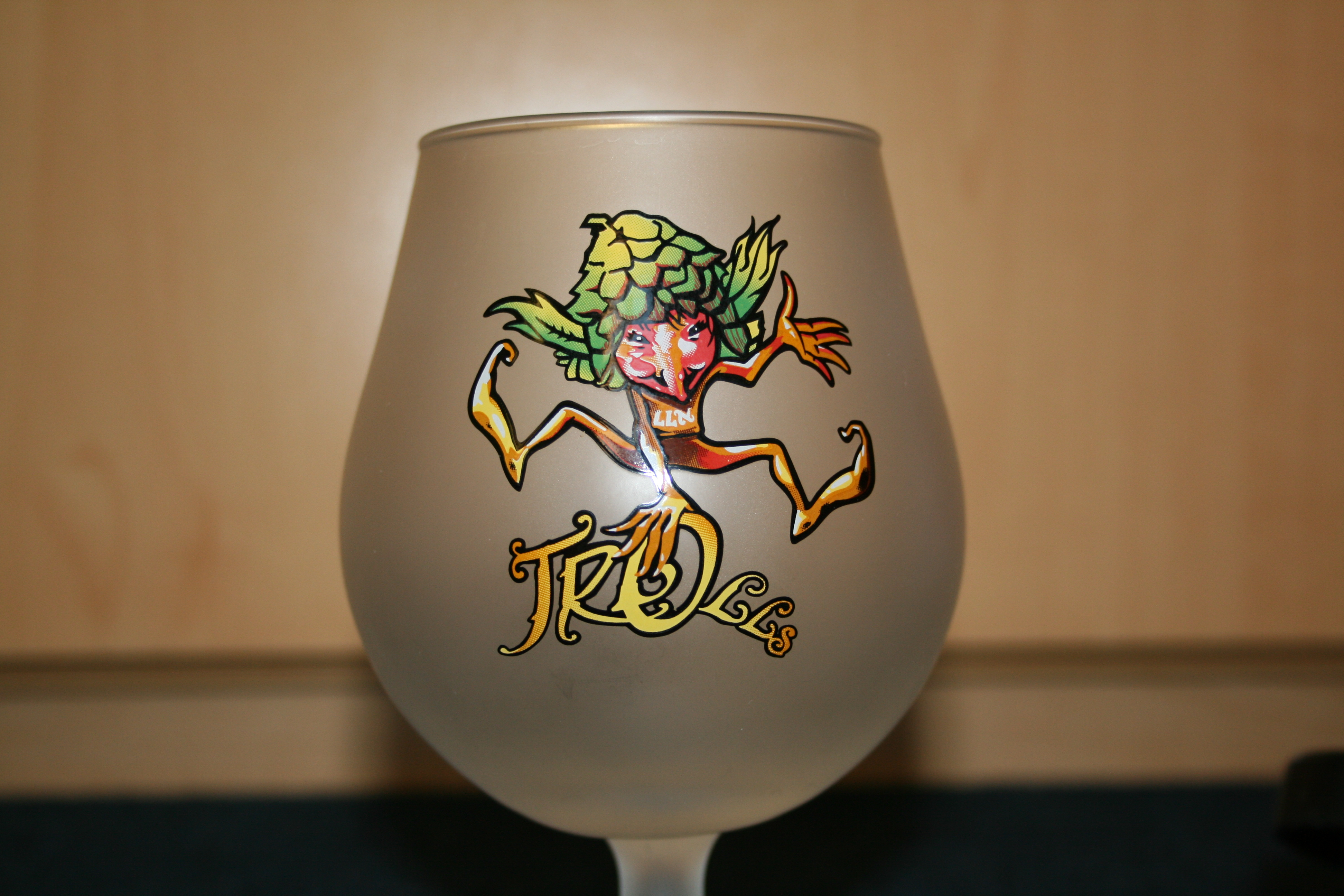 Verre de bière Troll